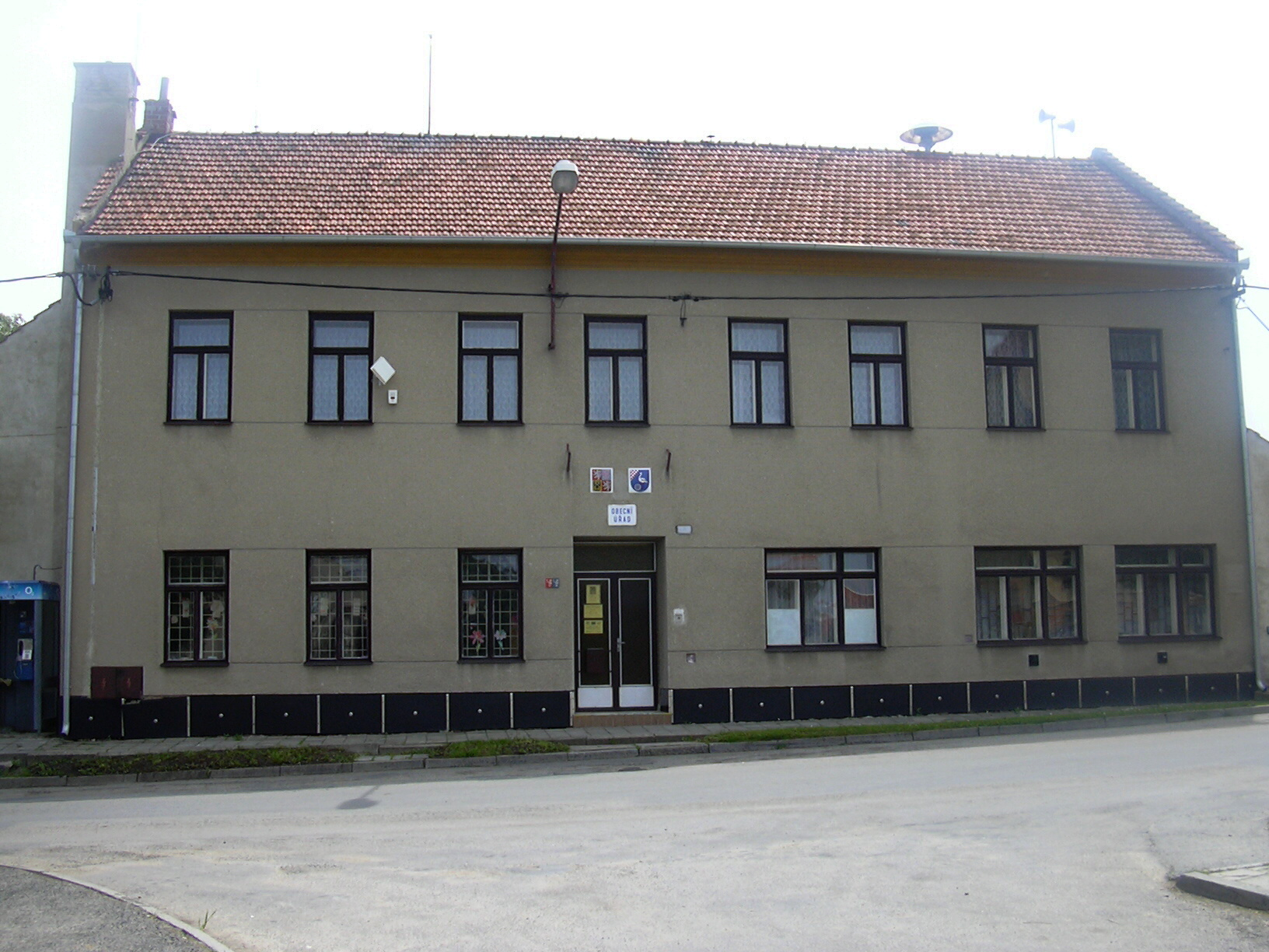 Obecní úřad Prusy-Boškůvky (Vyškov- Czech republic)